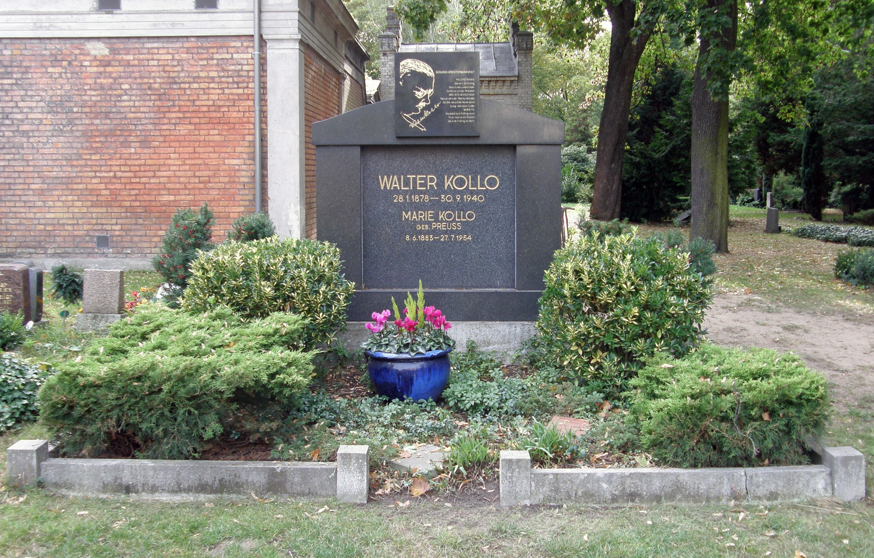 Grab von Walter Kollo auf dem Friedhof II der Sophiengemeinde Berlin in Berlin-Mitte, Ehrengrab